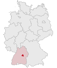 Landkreis Esslingen, Baden-Württemberg, Germany